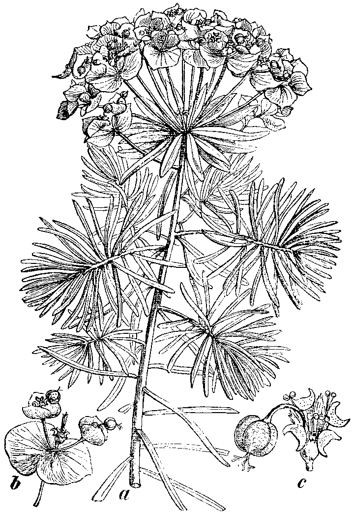 Euphorbia cyparissias, Slika 115. Garjevi mleček. (Euphórbia Cyparíssias)